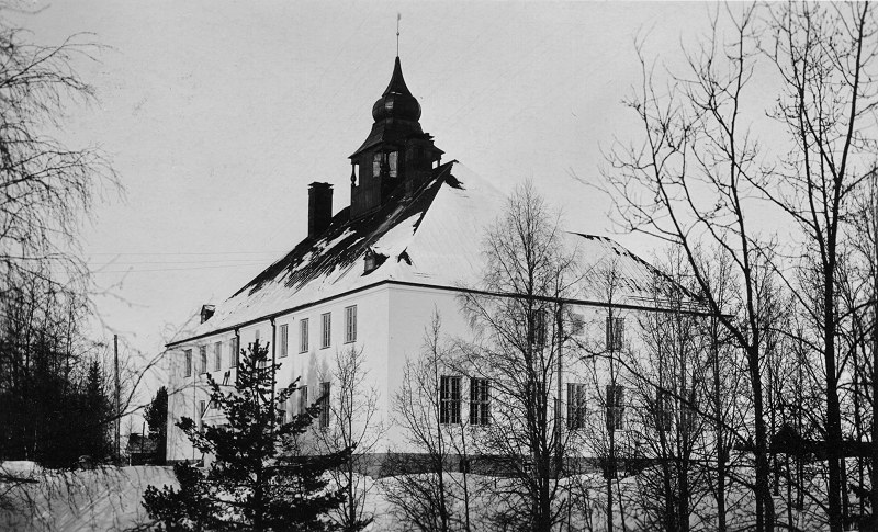 Strömsund. Ströms tingshus.